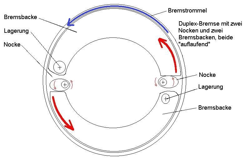 Schematisches Funktionsprinzip einer Duplexbremse mit auflaufenden Bremsbacken.